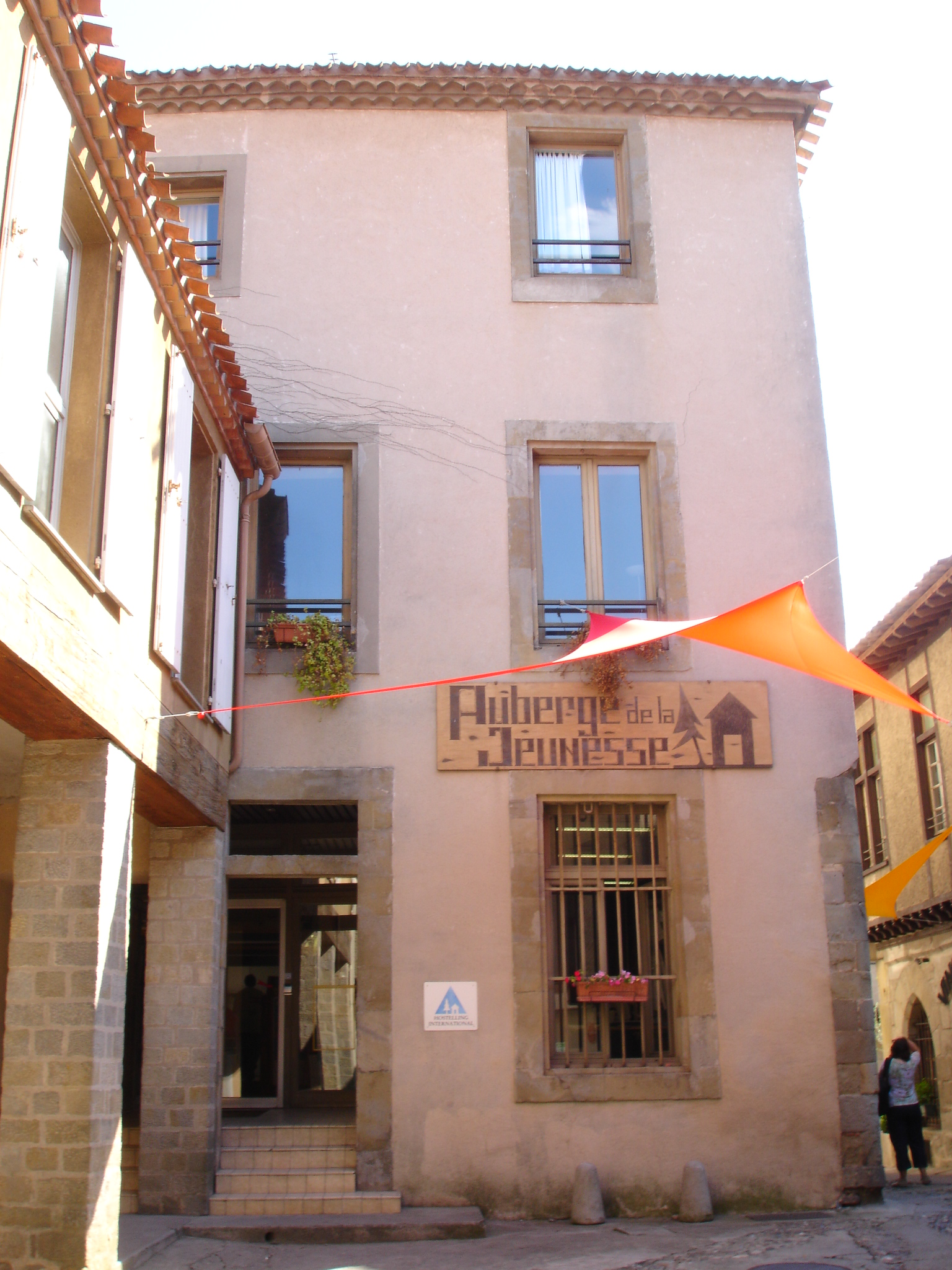 Carcassonne (Aude, Languedoc-Roussillon, France) - Auberge de jeunesse.